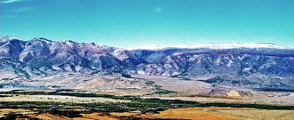 Северный фас Курайского хребта в Горном Алтае. Вся правая часть борта представляет собой предгорную лестницу единой прежде поверхности выравнивания, разбитую на блоки, поднятые новейшими тпктоническими движеними на разлинуы высоту, вплоть до водораздела.